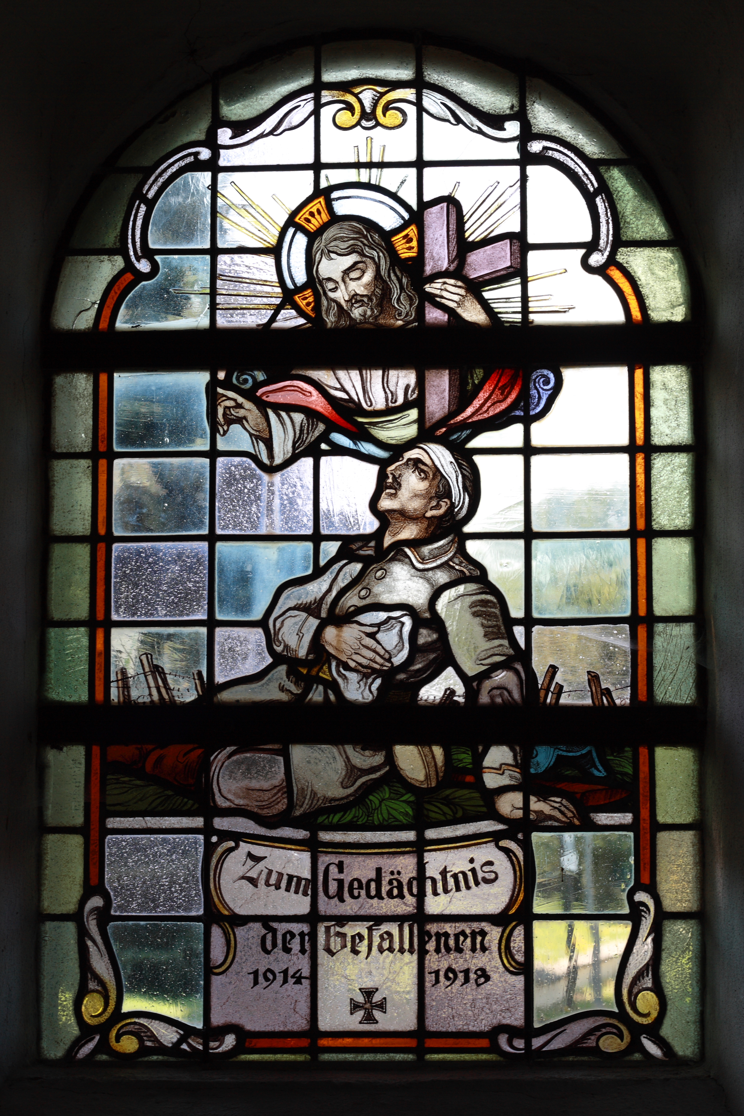 Bleiglasfenster in der katholischen Filialkirche St. Matthias in Köttelbach, einem Ortsteil von Kelberg, Darstellung: "Kriegsfenster", Herstellung: Glasmalerei H. Maier (Bad Neuenahr), um 1920